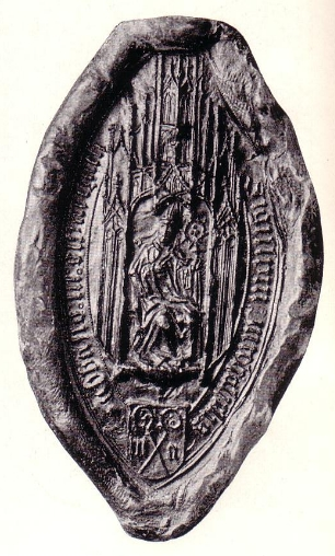 Umschrift: Sigillum Michaelis Abbatis in Swarzach.